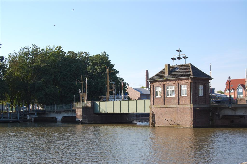 De stadsbrug over de jachthaven in het centrum van Leer.